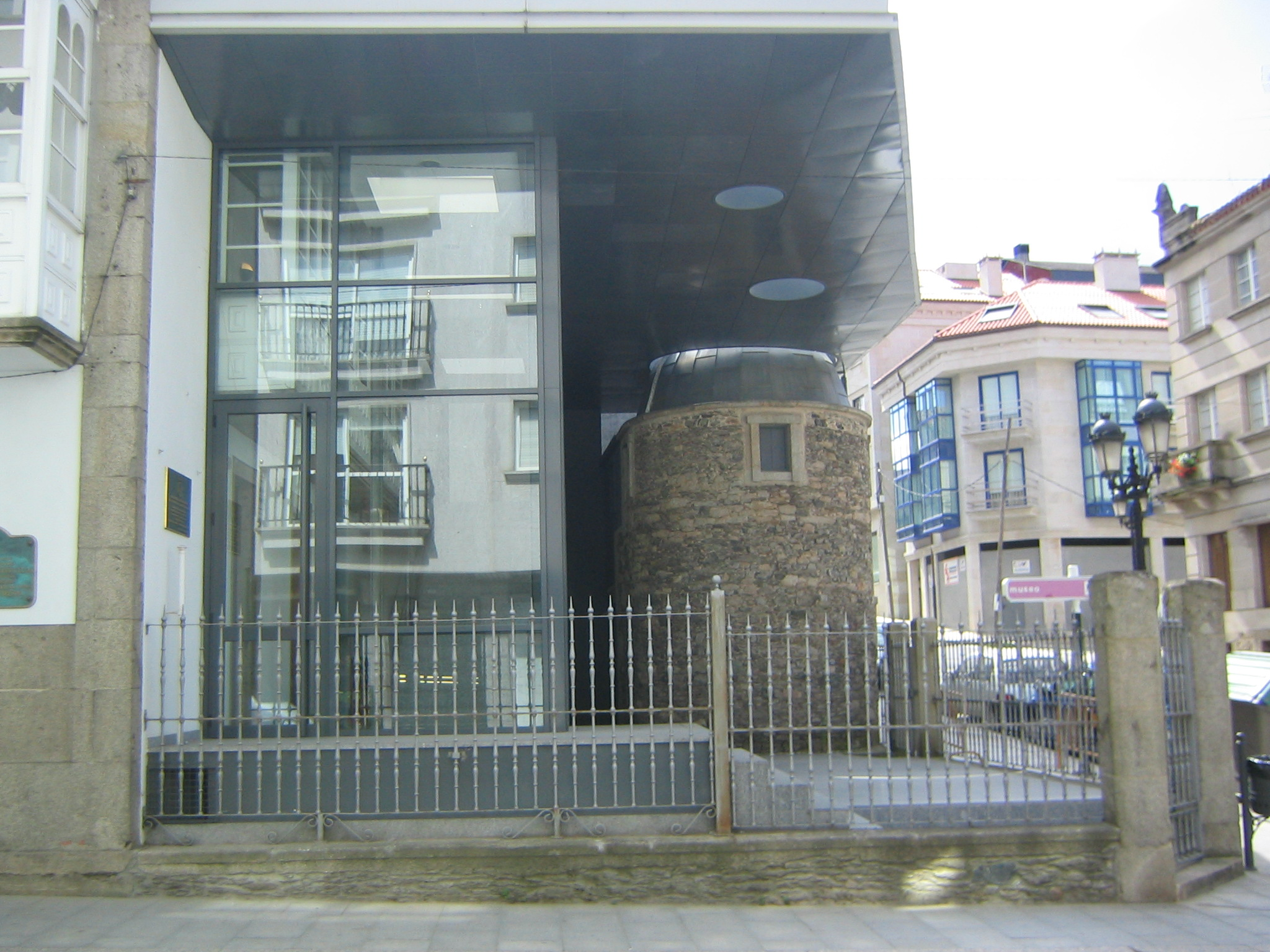 Observario de Lalín de Ramón Aller